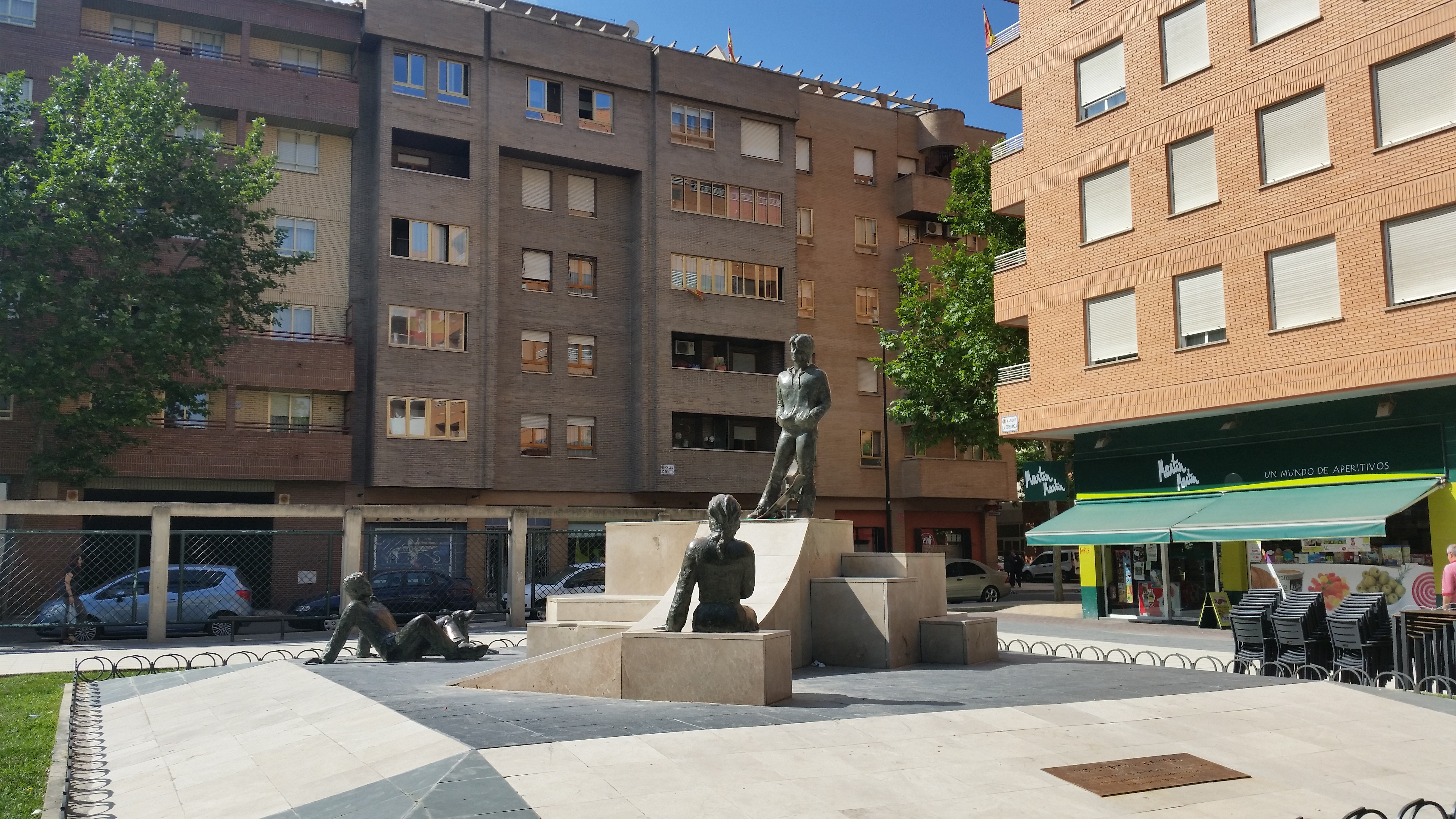 Zaragoza - Parque de la esperanza - Monumento a los niños (1991) de Carlos Pérez de Albéniz Navarro - En homenaje a los asesinados por ETA en el atentado del 11 de diciembre de 1987 contra la casa cuartel que se encontraba en el solar que ocupa ahora el parque.